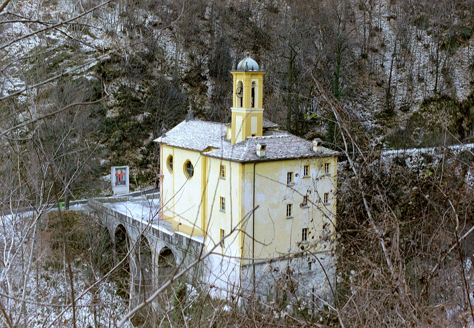 Chiesa Santuario della Santa Maria Addolorata del Sacro Monte con Via crucis